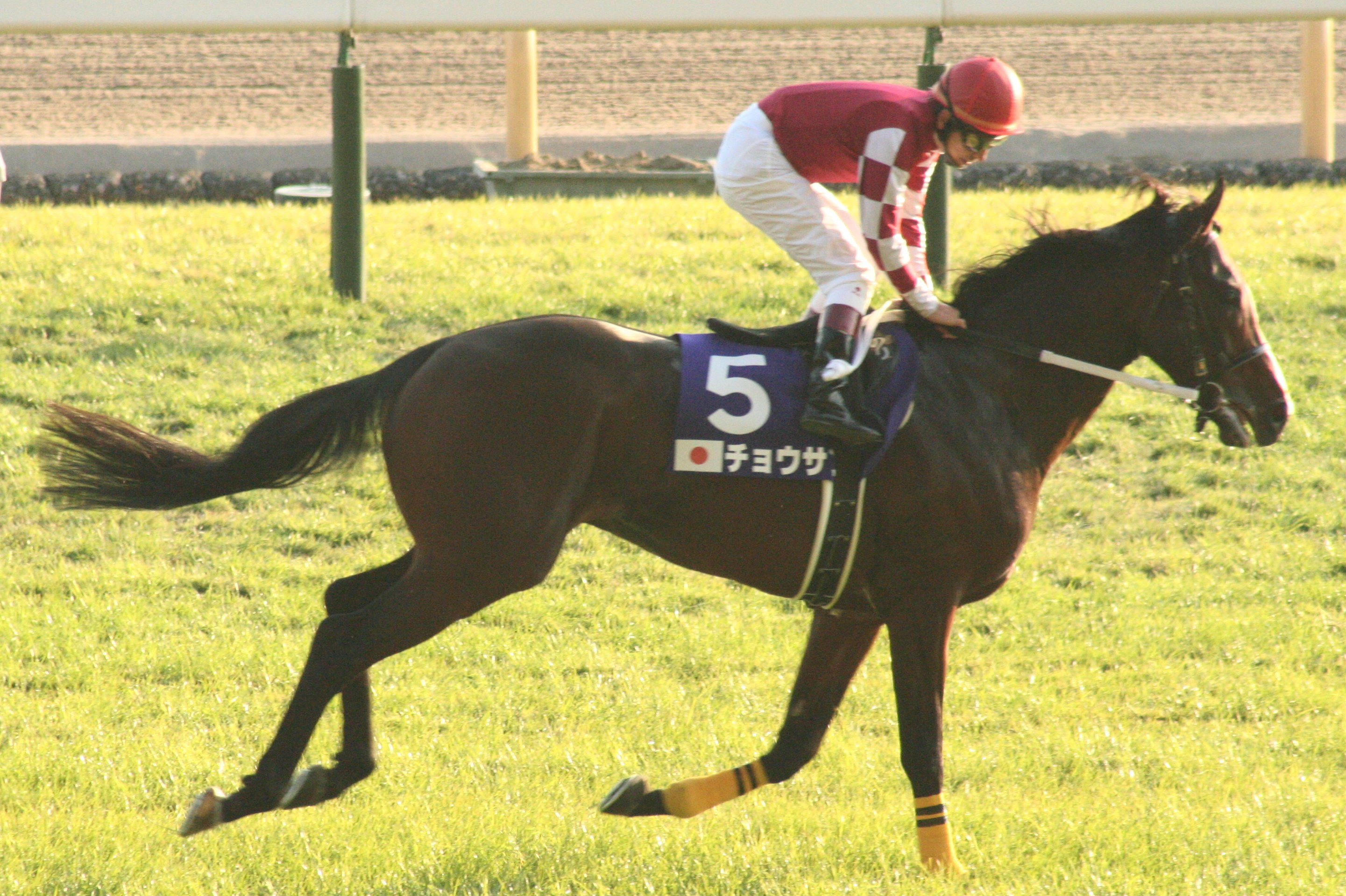 チョウサン